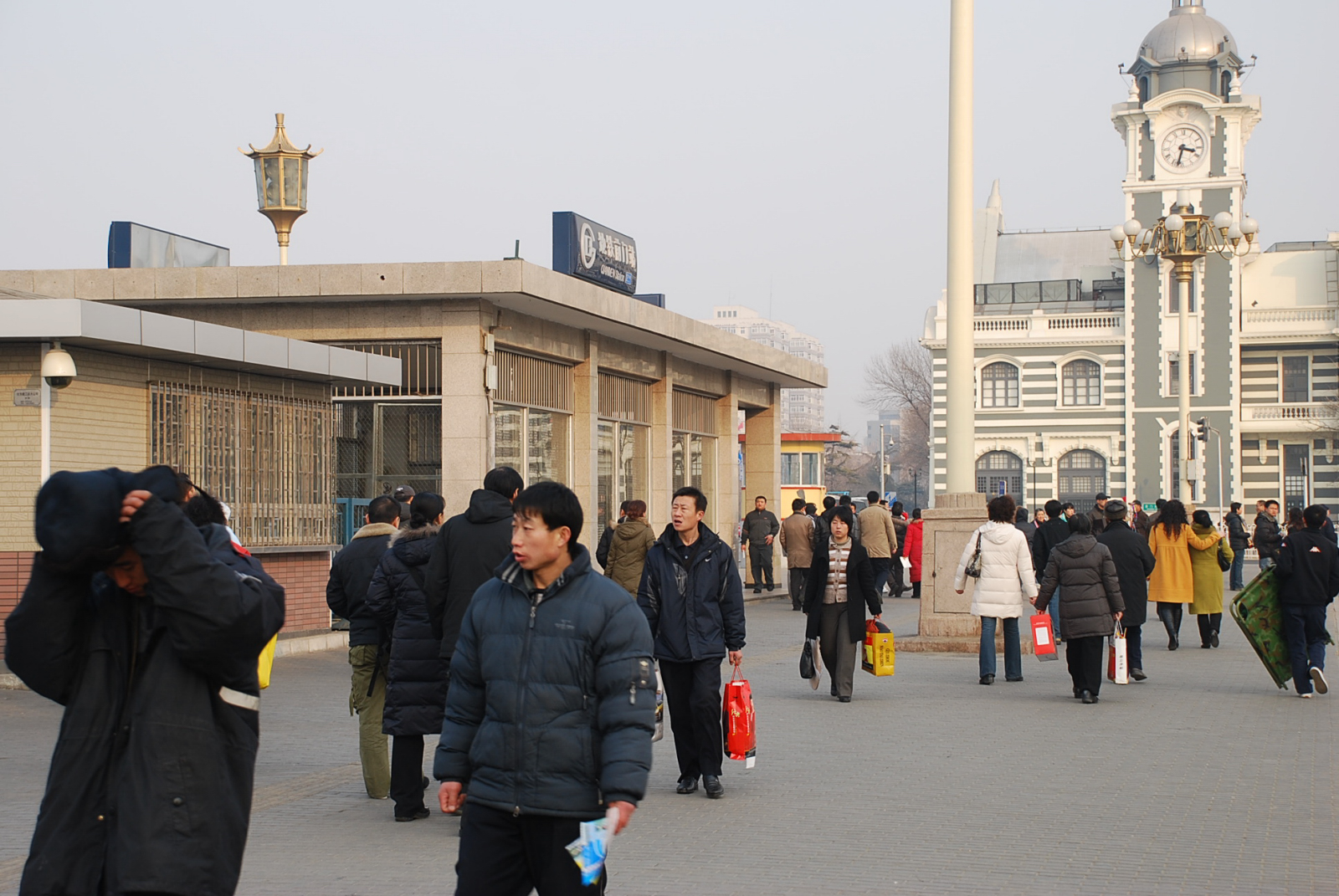 地铁前门站